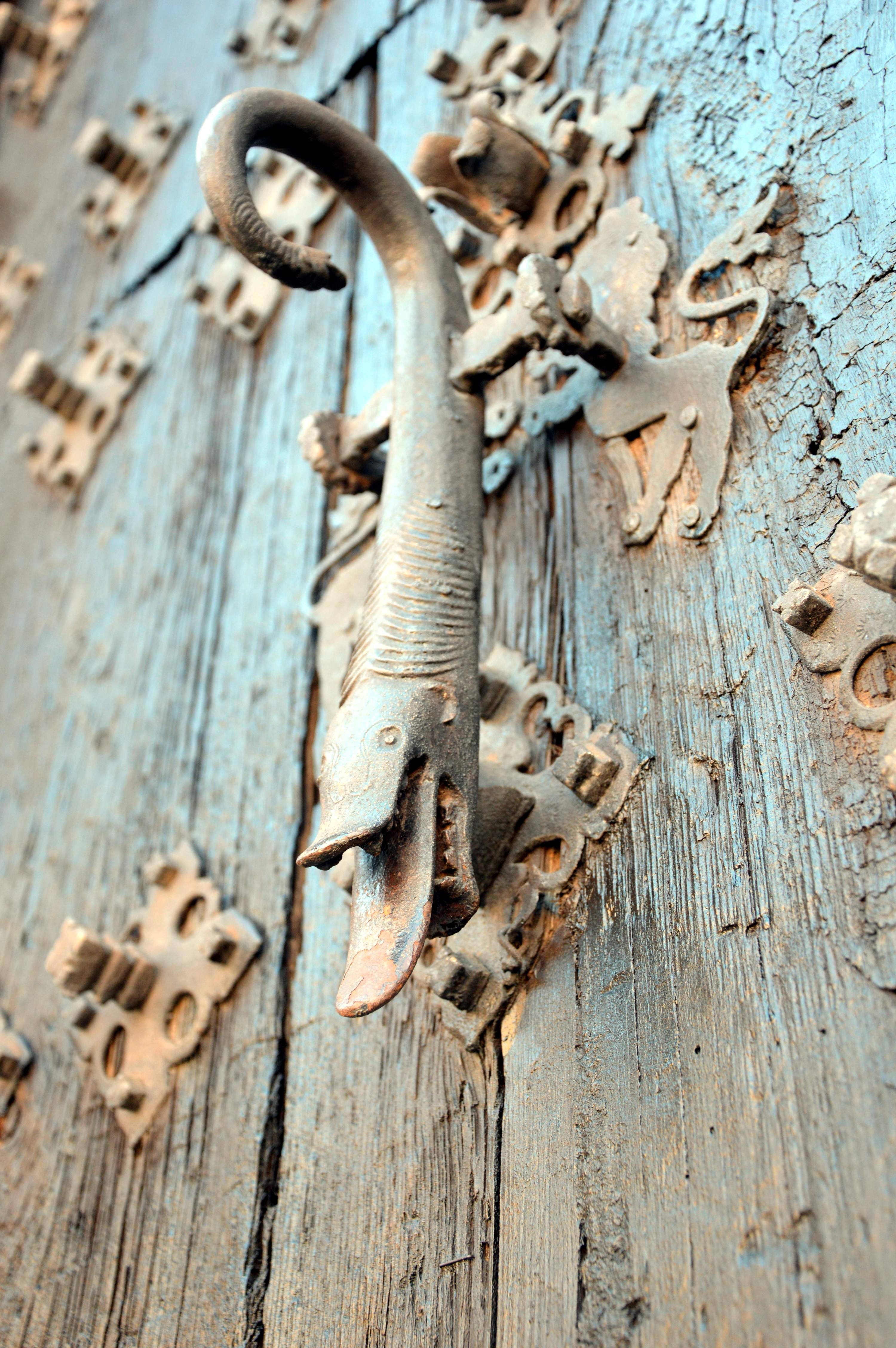 Detalle de aldaba o picaporte en hierro de forja en la puerta de una casa de Albarracín (Teruel), 2017.